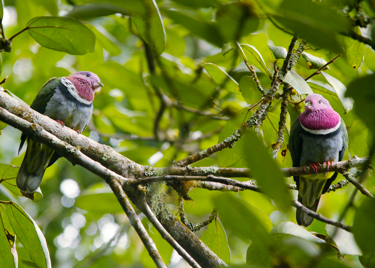 Ptilinopus porphyreus is vrugtevretende voëls van die duiffamilie (Columbidae), met 'n pienk-perserige veredos aan die hals en kop, soos ook aangedui deur hul Indonesiese naam Walik kepala-ungu, of in Engels, Pink-headed fruit-dove. Die spesie is een van die bekoorlikhede van die Indonesiese voëllewe, en word net in die bergwoude van Soematra, Java en Bali aangetref. Hier is hulle afgeneem te Raden Soerjo-bospark te Mojokerto in Oos-Java, Indonesië. Die wyfies van die spesie het 'n meer gedempte kopkleur (links) in vergelyking met die mannetjies.